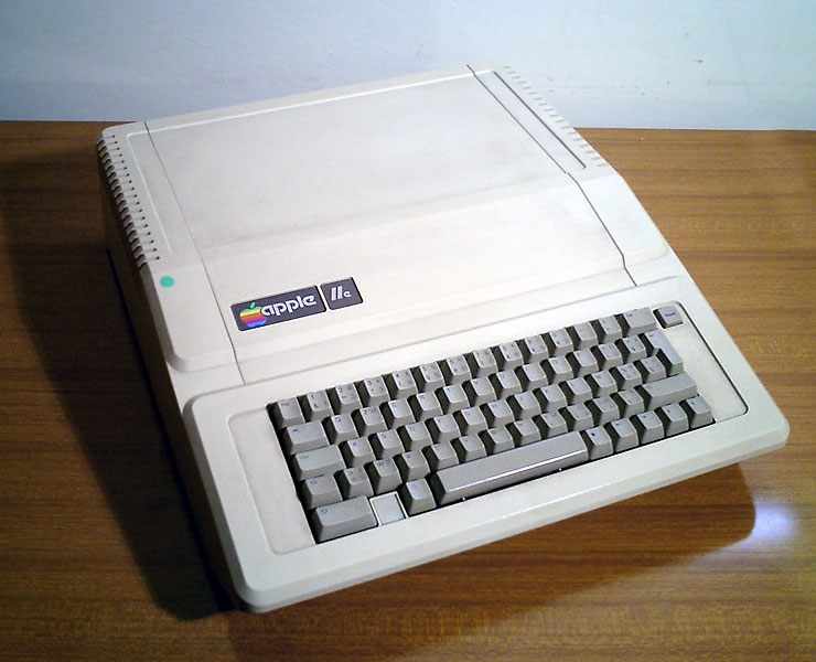 Apple IIe computer